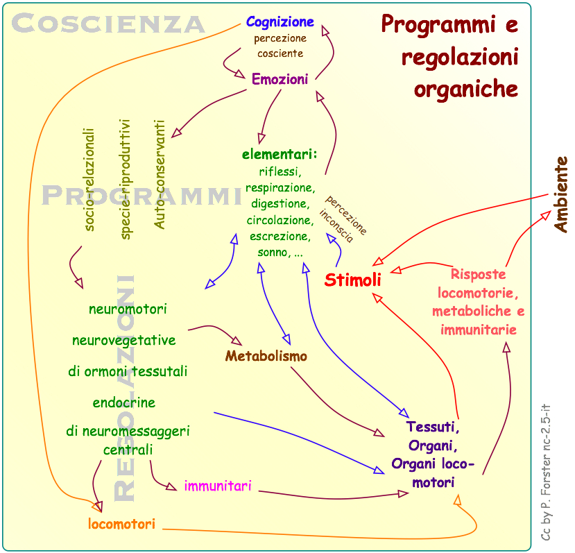 Grafica: Medicina: Fisiologia: Psicologia: Stress: Programmi e regolazioni organiche: ambiente, stimolo, percezione, programmi elementari, auto-conservanti, specie-riproduttivi, socio-relazionali, emozioni, cognizione, regolazioni, neuromotori, neurovegetative, di ormoni tessutali, endocrine, di neuromessaggeri centrali, locomotori, immunitari, metabolismo, tessuti, organi, risposte, medicina popolare, laica, complementare, non convenzionale, alternativa